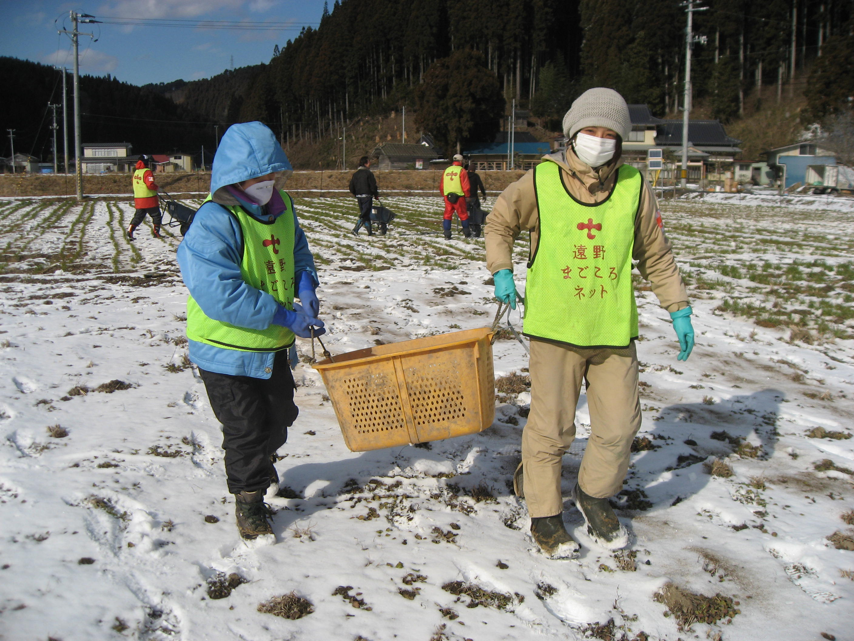 有志によるボランティア隊活動